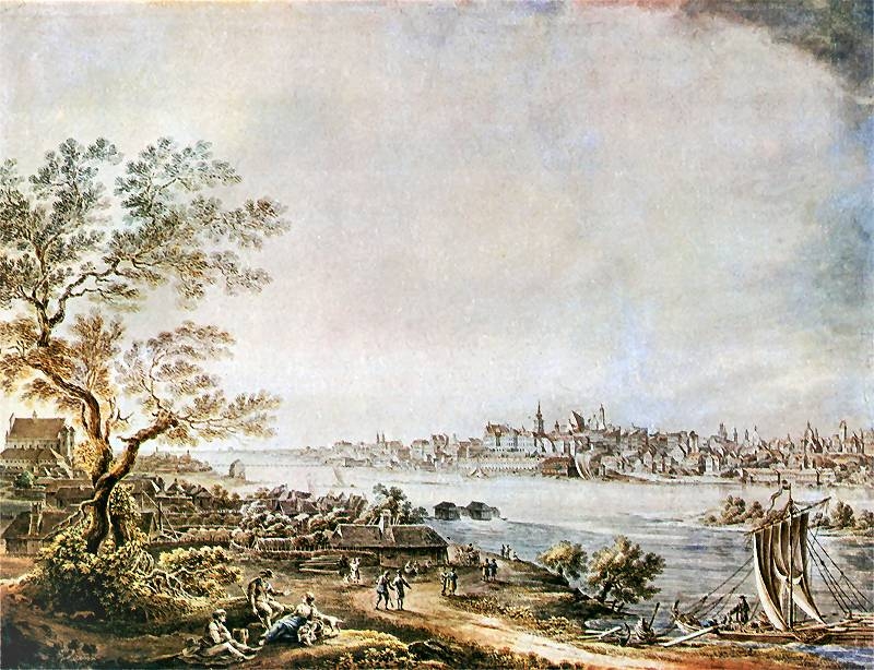 autor: Zygmunt Vogel (1764 – 1826) - "Widok Warszawy od strony Pragi". Na pierwszym planie z lewej Golędzinów.